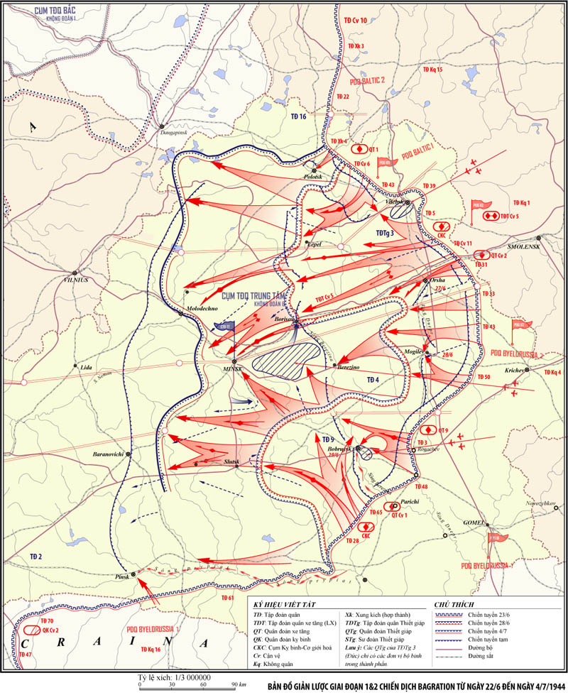 Giai đoạn 1&2 của Bagration, lấy từ Tập tin:Belorussia Operation Russian Map.png